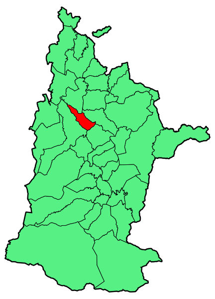 Aipaturiko udalerriaren kokapena Zuberoan